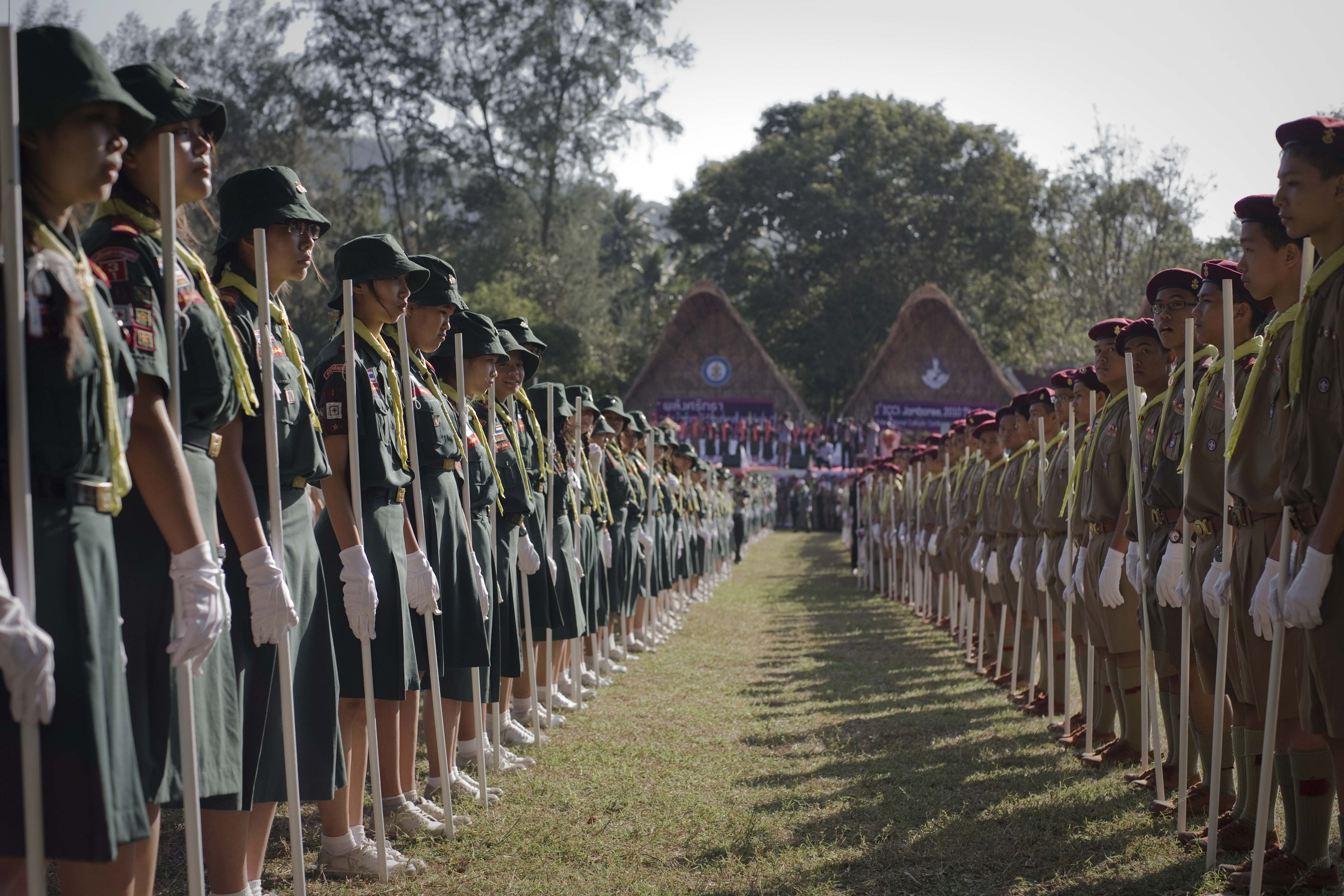 นายกรัฐมนตรี เป็นประธานเปิดงานชุมนุมลูกเสือคาทอลิกโลก ครั้งที่ 1 ณ ค่ายลูกเสือแห่งชาติวชิราวุธ อำเภอศรีราชา จังหวัดชลบุรี วันจันทร์ ที่ 27 ธันวาคม พ.ศ.2553 (Photographer attached to the Prime Minister of the Kingdom of Thailand : Peerapat Wimolrungkarat / พีรพัฒน์ วิมลรังครัตน์) @is50mm